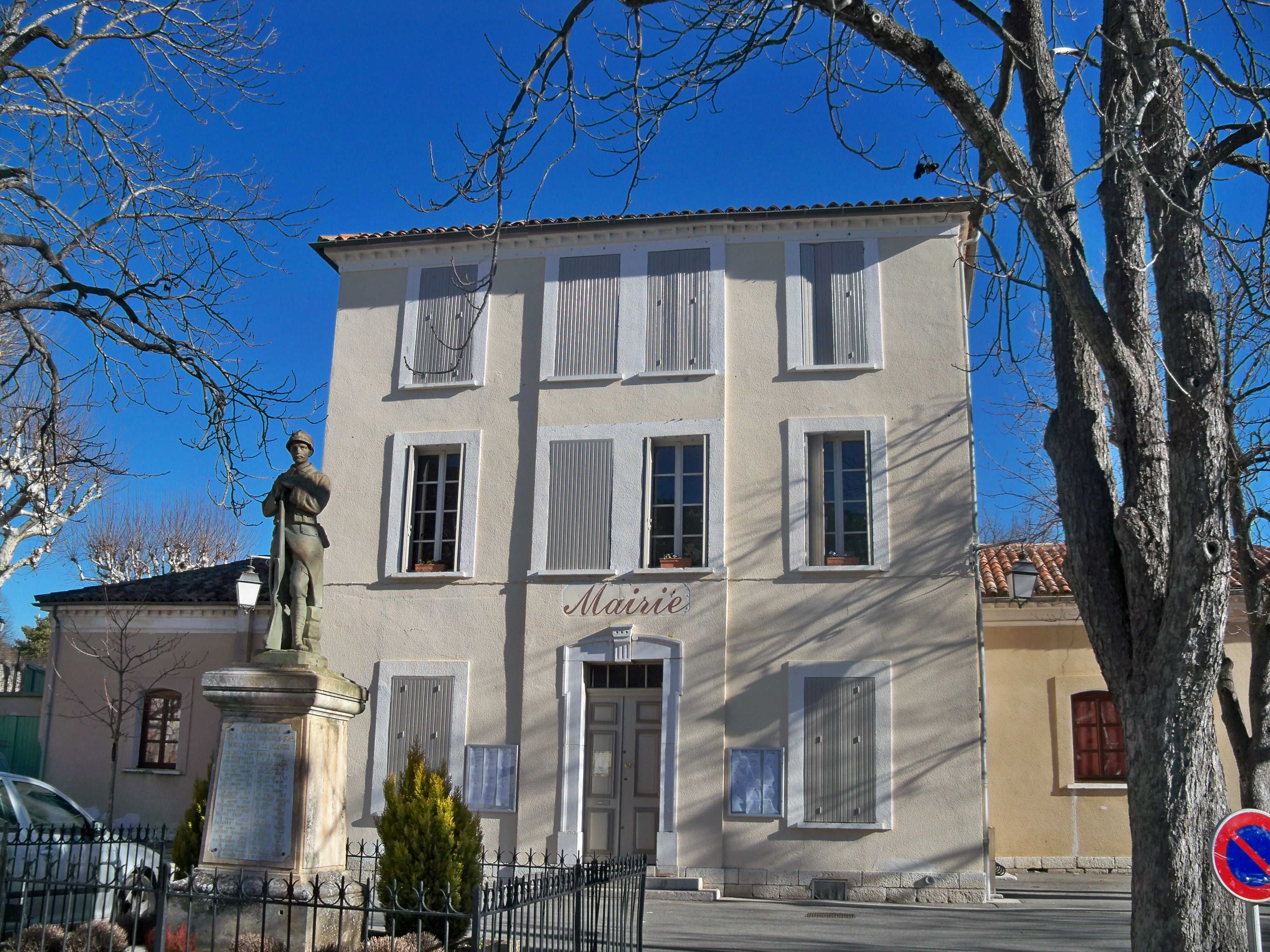 Mairie de Quinson (04), France